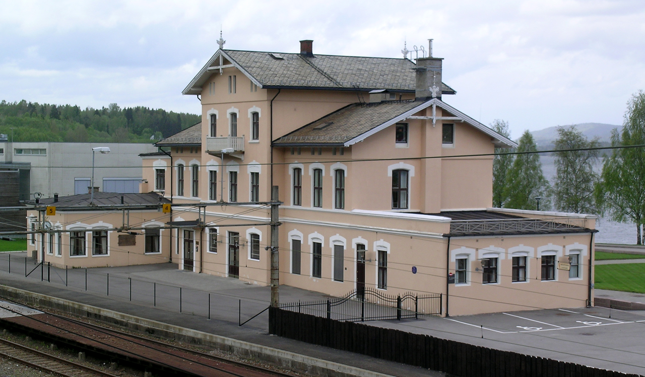 Eidsvoll stasjon. Bygd 1878. Arkitekt: Jacob Nordan.